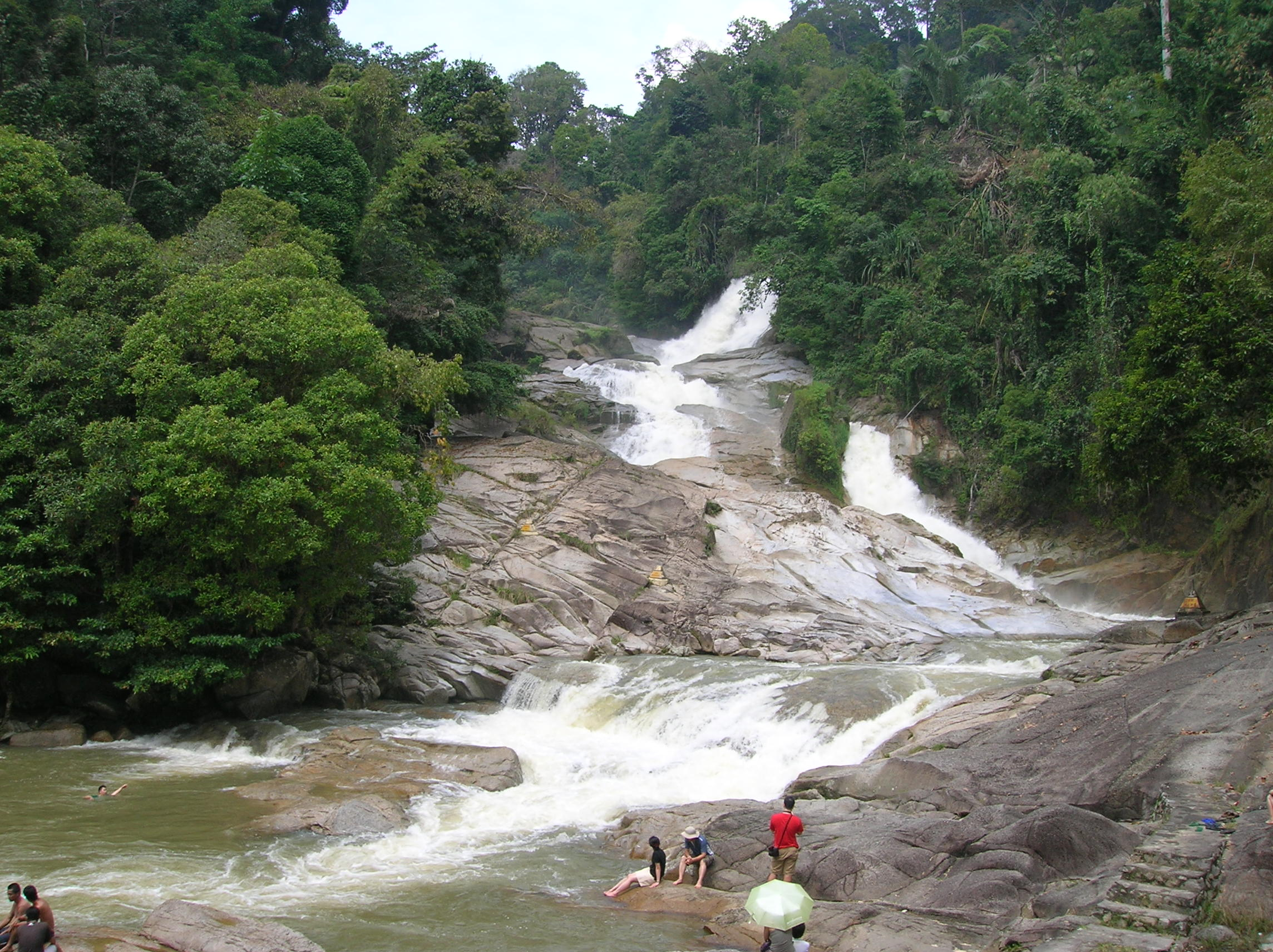 Terletak dalam kawasan Hutan Simpan Kekal (HSK) Bukit Tinggi.